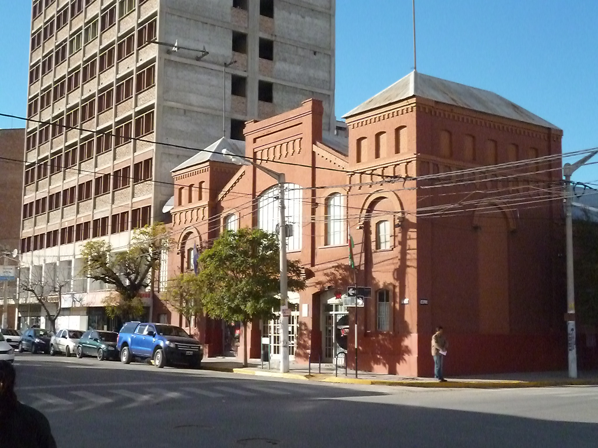 Salon San David, Trelew